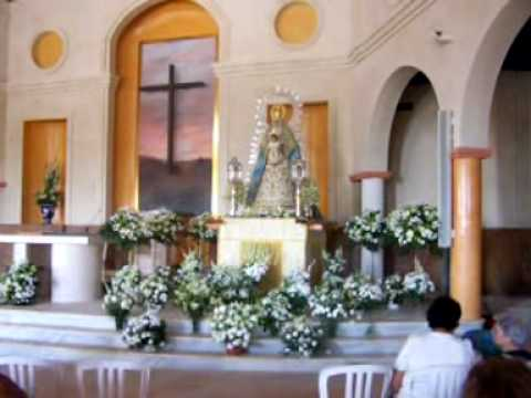 Virgen del Aguila en la Iglesia de Santa María y San Miguel en Alcala de Guadaira